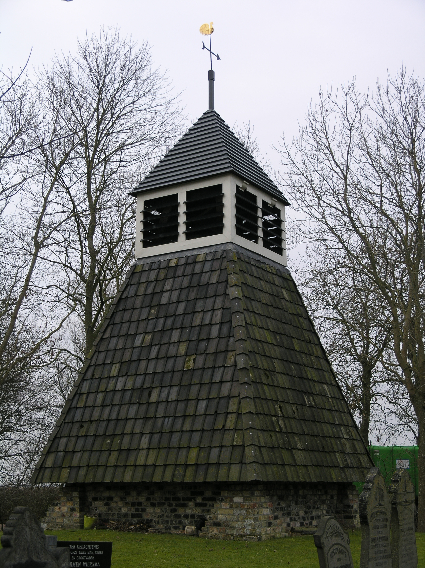 Hartwerd Klokhuis